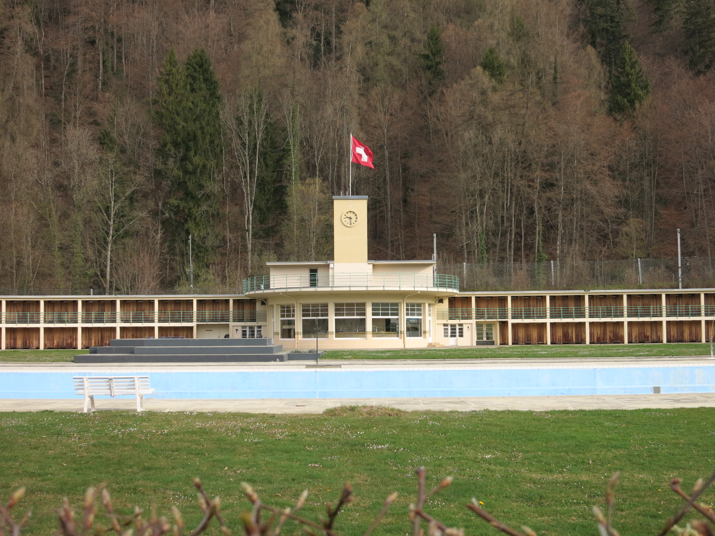 Bad, Interlaken BE, Schweiz